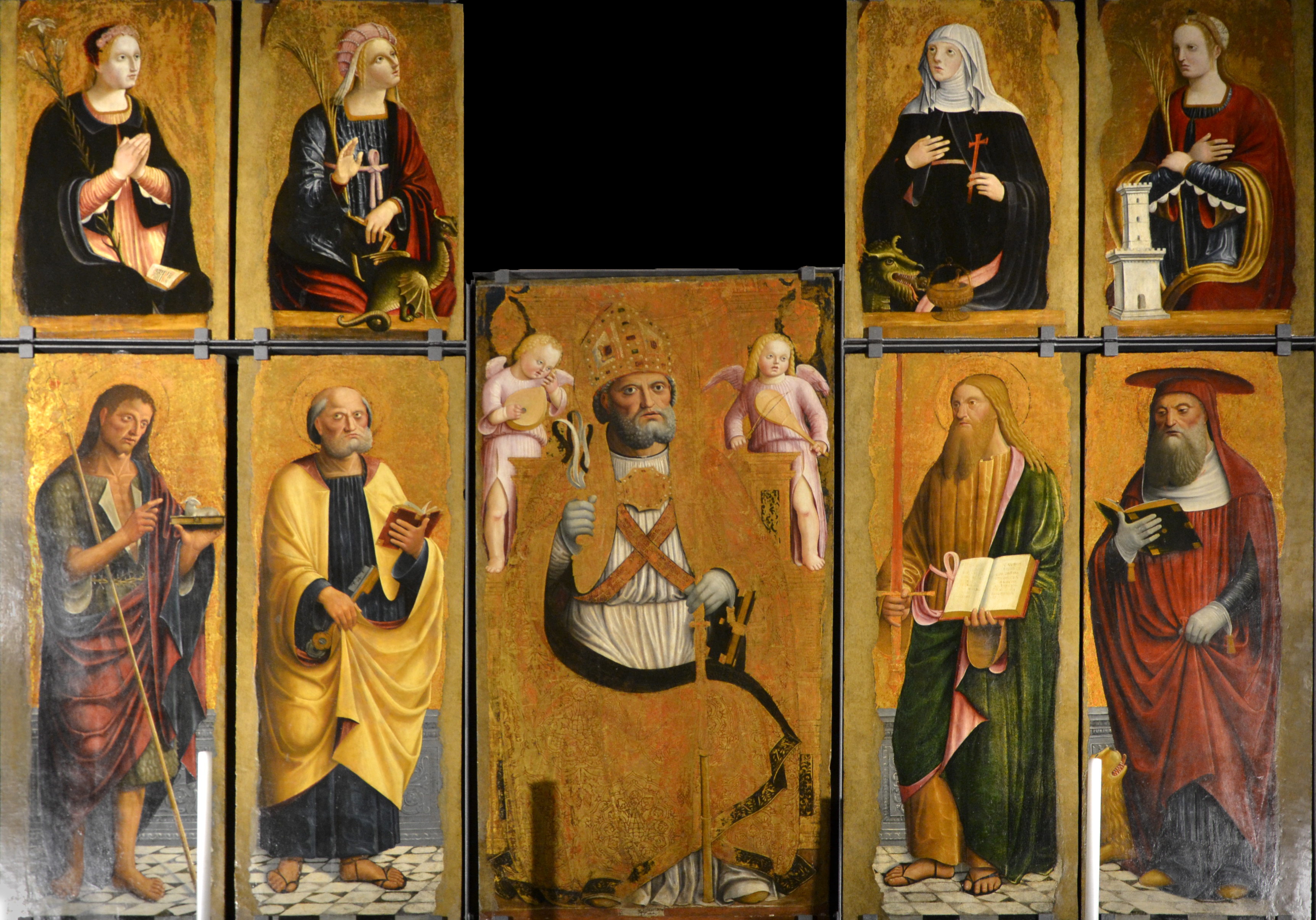 Giovanni Barbagelata, Sant'Ambrogio, santi e angeli musicanti, Collegiata di Sant'Ambrogio (Varazze)